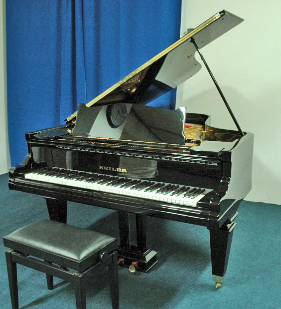 Fortepian Seiler